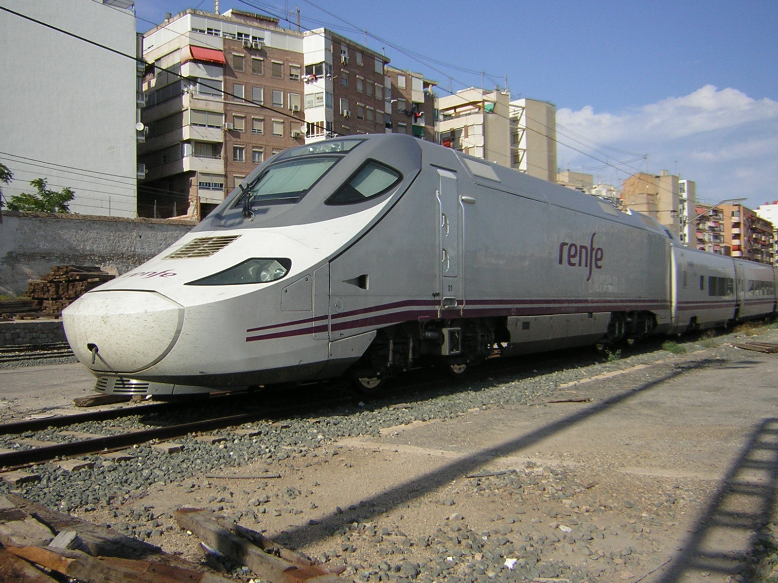 Unidad de Alta Velocidad serie 130 apartado en Alicante Término durante las pruebas de homologación.